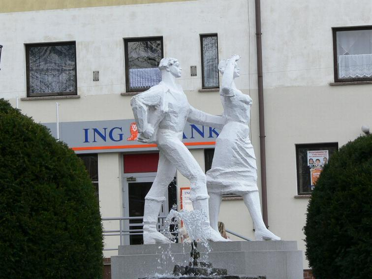 Karolinka-und-Karlik-Denkmal.